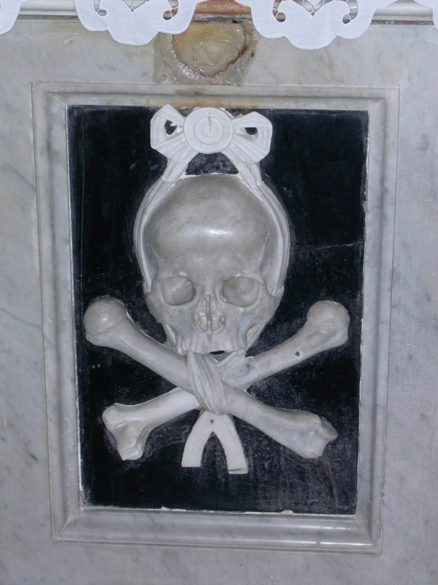 Une tête de mort et les ossements, symboles de la découverte du crâne d'Adam lors de la crucifixion du Christ, support de marbre d'un des collatéraux de l'église de Zadar, Croatie, août 2005 Auteur: Guilhem Dulous